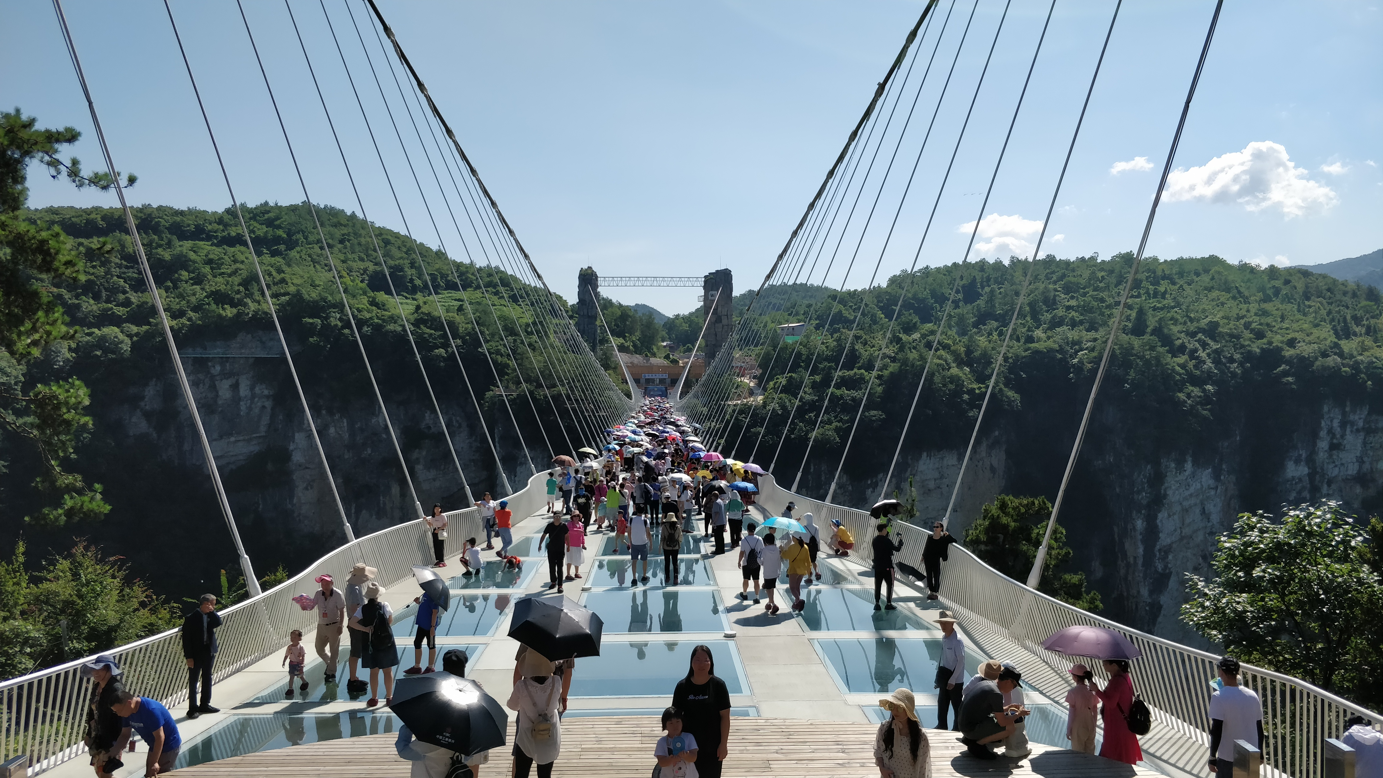 中文（中国大陆）: 张家界 大峡谷 玻璃桥